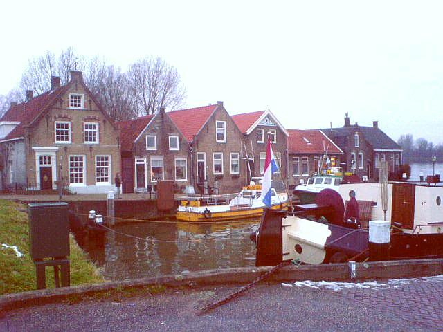 Puttershoek, gezicht op de haven.